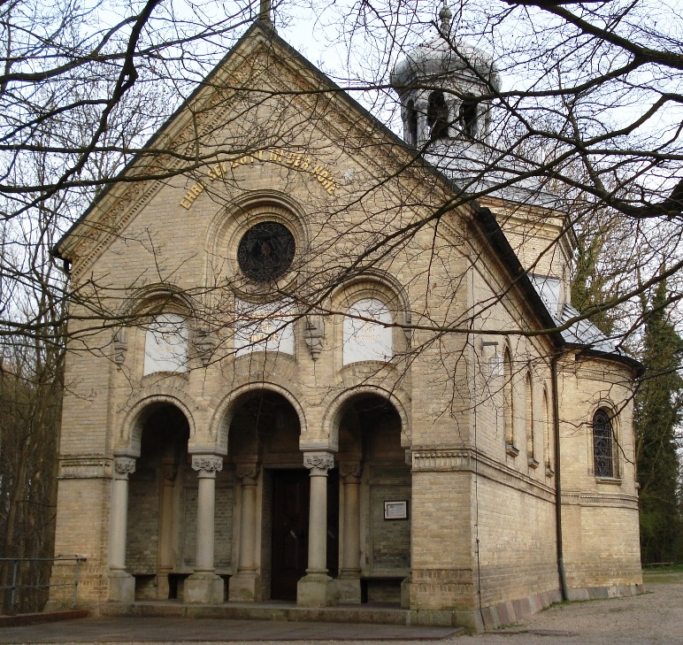 Kapelle Sophienhof